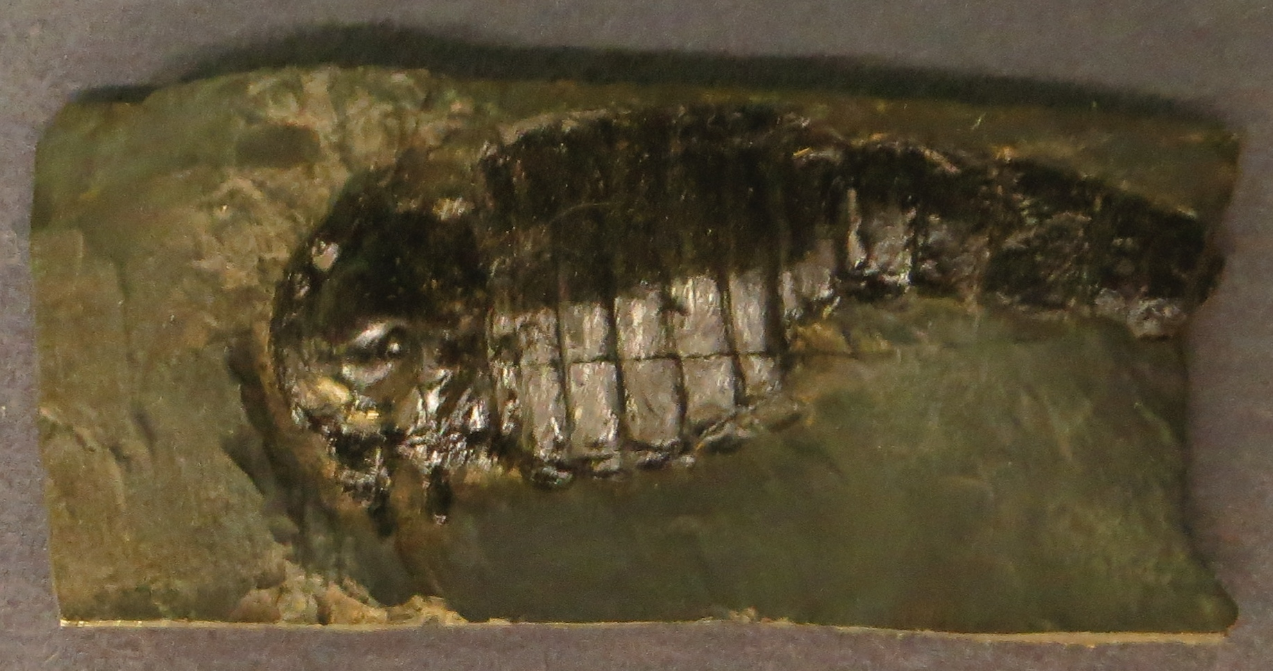 Took the picture at Senckenberg Museum, Frankfurt